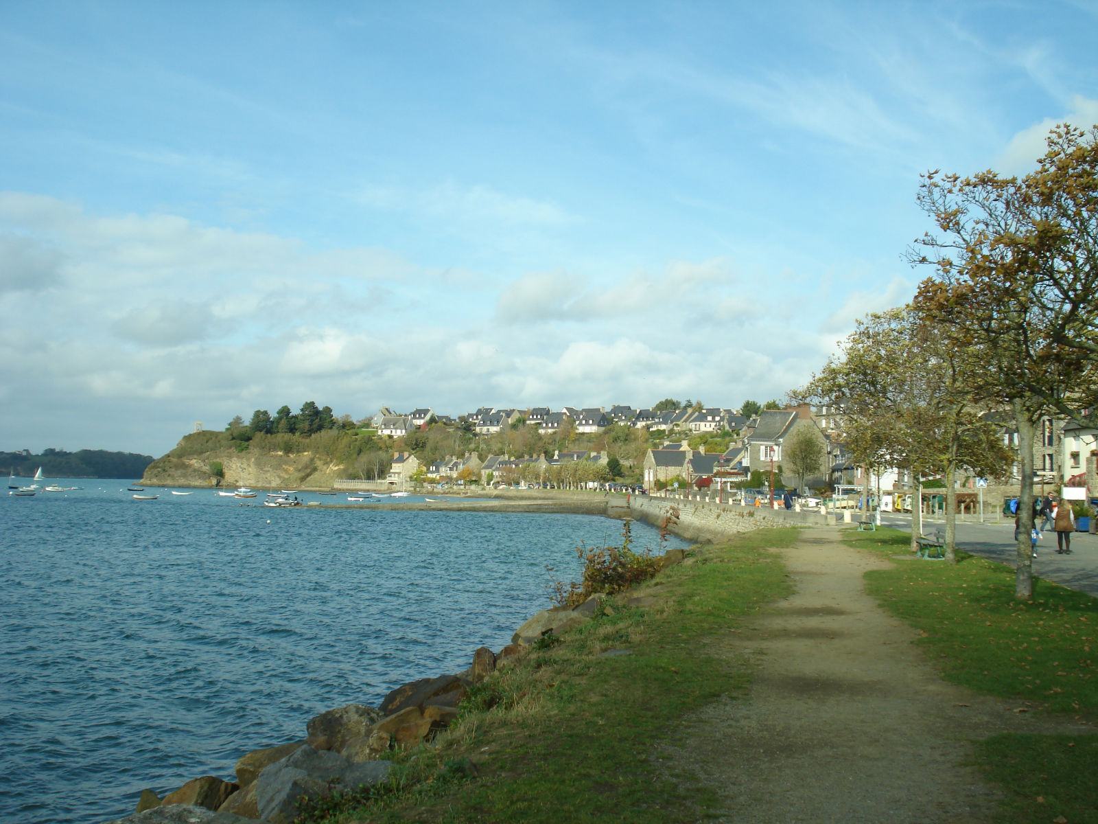 Saint-Suliac - Novembre 2011